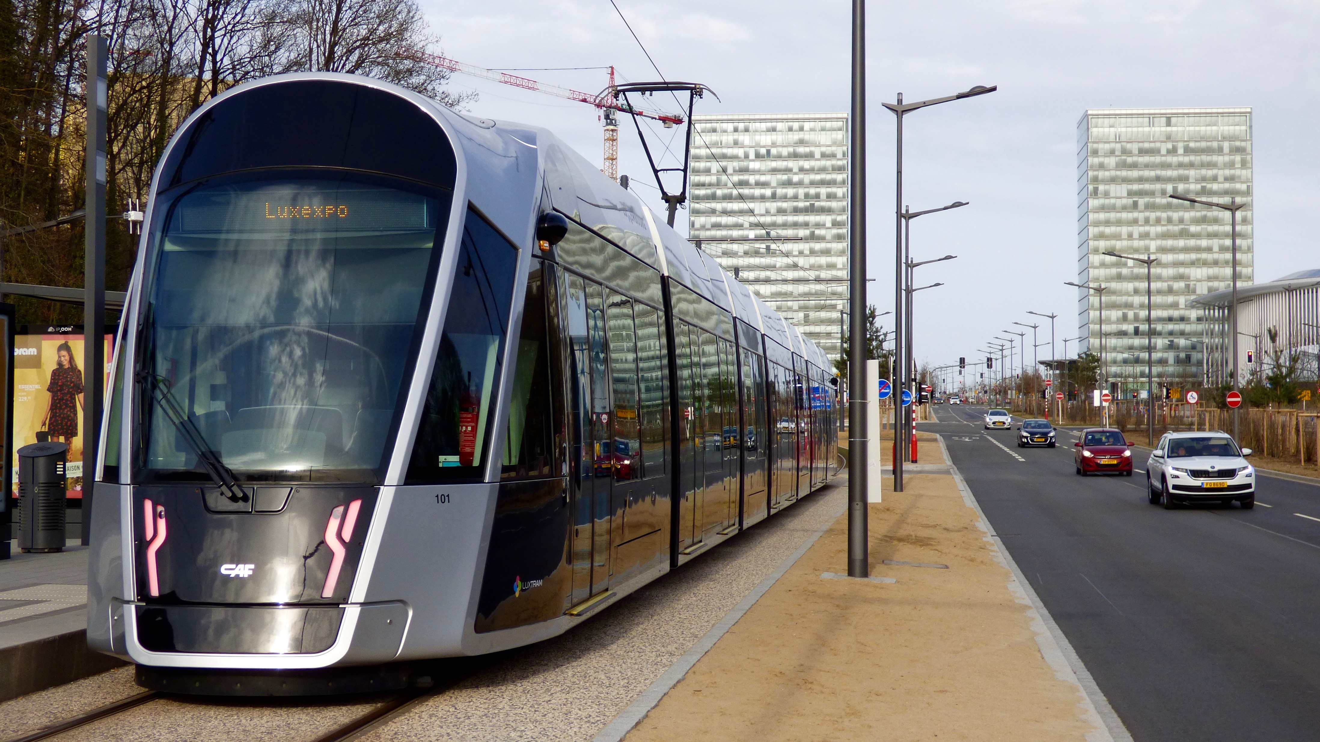 Halt ROUT BRECK-PAFENDALL